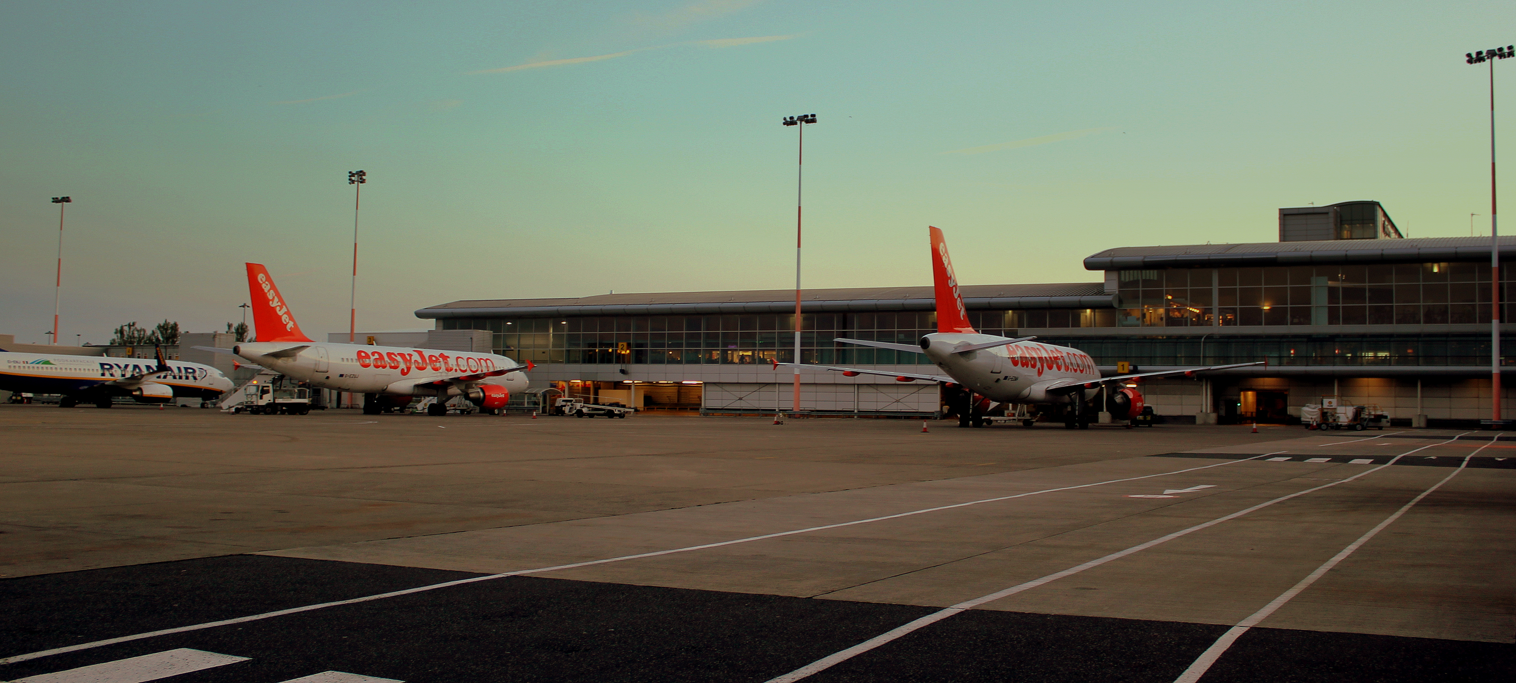 EASYJET AIRBUS A319 AND A320 AND A RYANAIR BOEING 737-800 AT LIVERPOOL JOHN LENNON AIRPORT JULY 2013